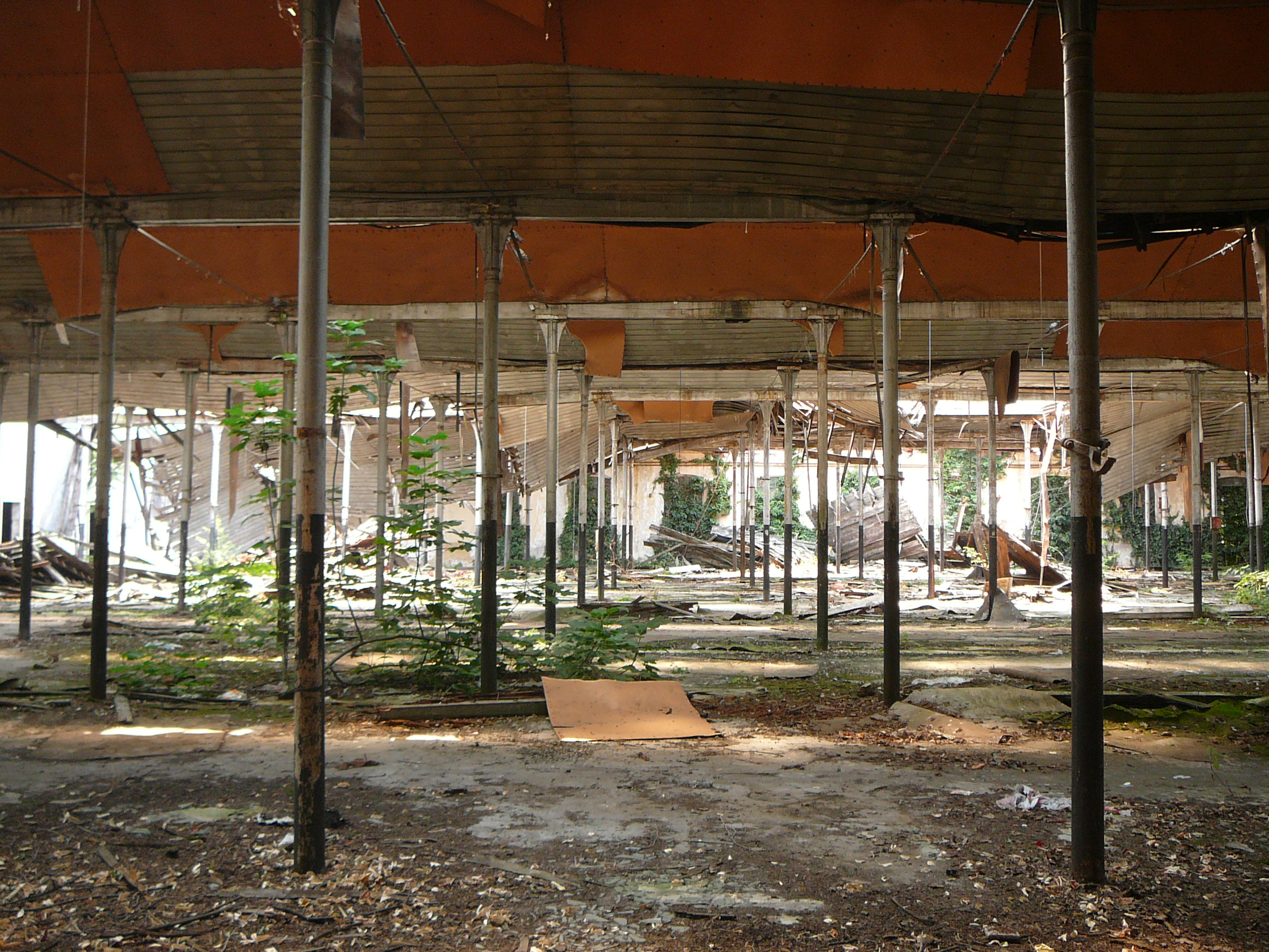 Ex calzaturificio Giuseppe Borri This is a photo of a monument which is part of cultural heritage of Italy.